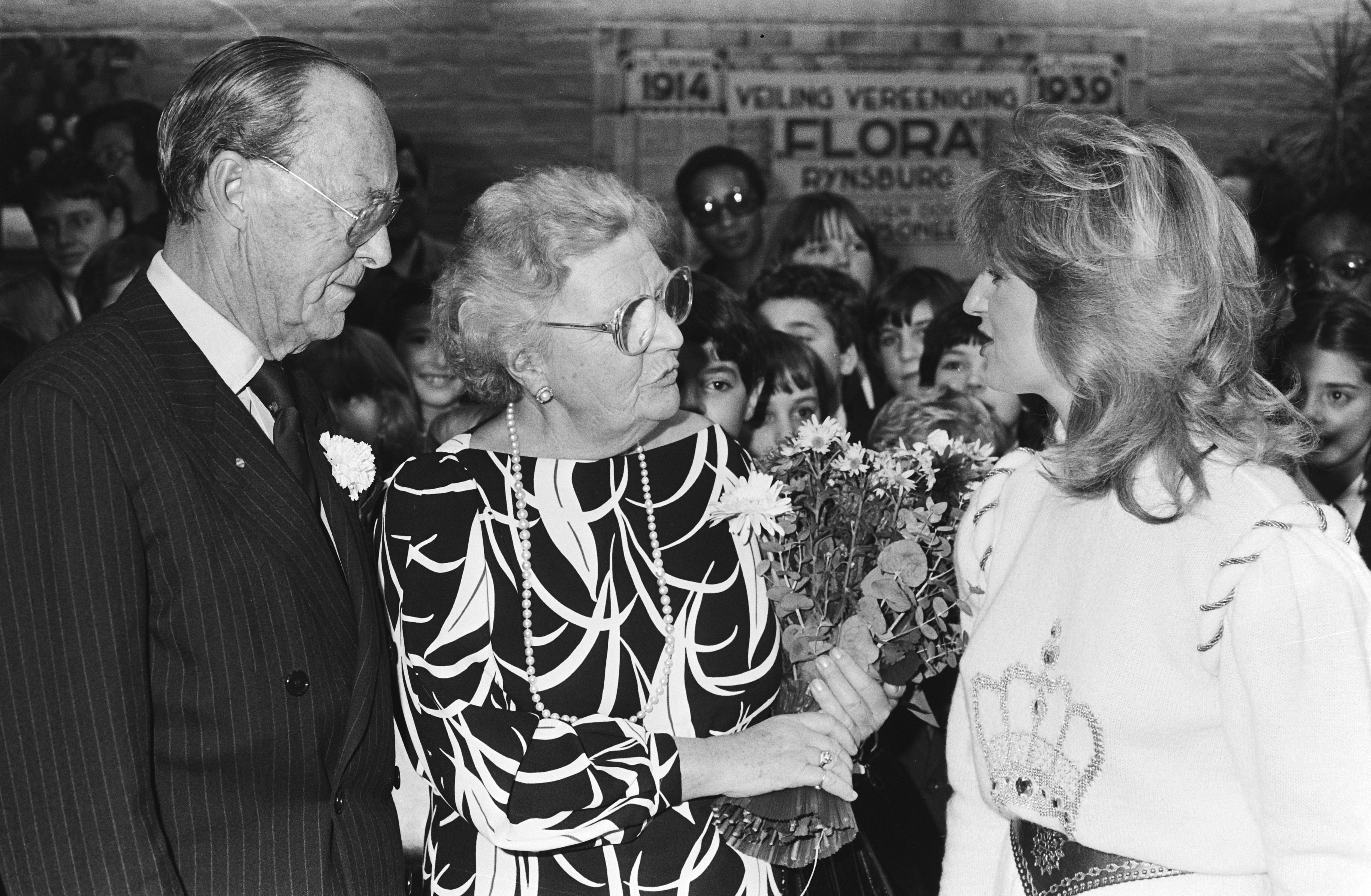 Collectie / Archief : Fotocollectie Anefo Reportage / Serie : Prinses Juliana en prins Bernhard zijn aanwezig op het Bloemengala Rijnsburg 1982, dat in het teken staat van de actie "Oerwoud Indonesië" van het Wereld Natuurfonds Nederland Beschrijving : Prinses Juliana, prins Bernhard met zangeres Anita Meyer Datum : 19 november 1982 Locatie : Rijnsburg, Zuid-Holland Trefwoorden : natuurbeheer, prinsen, prinsessen, zangers Persoonsnaam : Bernhard (prins Nederland), Juliana (koningin Nederland), Meyer, Anita Fotograaf : Antonisse, Marcel / Anefo Auteursrechthebbende : Nationaal Archief Materiaalsoort : Negatief (zwart/wit) Nummer archiefinventaris : bekijk toegang 2.24.01.05 Bestanddeelnummer : 932-4145